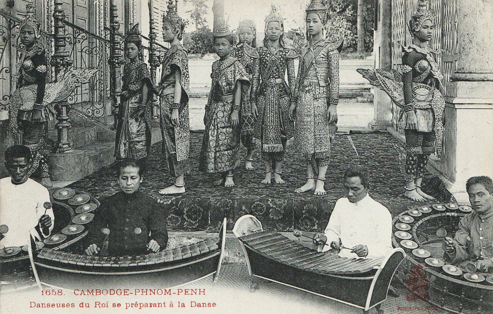 Carte postale ancienne. Pierre Dieulefils. Cambodge. Phnom-Penh. Danseuses du Roi se préparant à la danse.